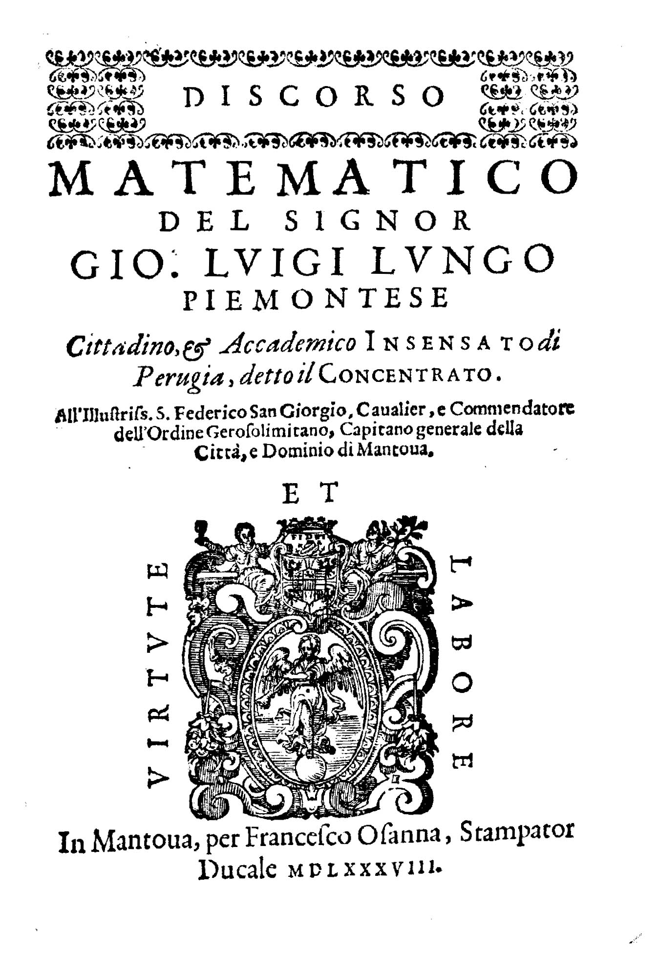 Discorso matematico del signor Gio. Luigi Lungo piemontese cittadino, & accademico Insensato di Perugia, detto il Concentrato. .... - In Mantoua : per Francesco Osanna, stampator ducale, 1588. - [8] 35, 1] p. ; 4º .